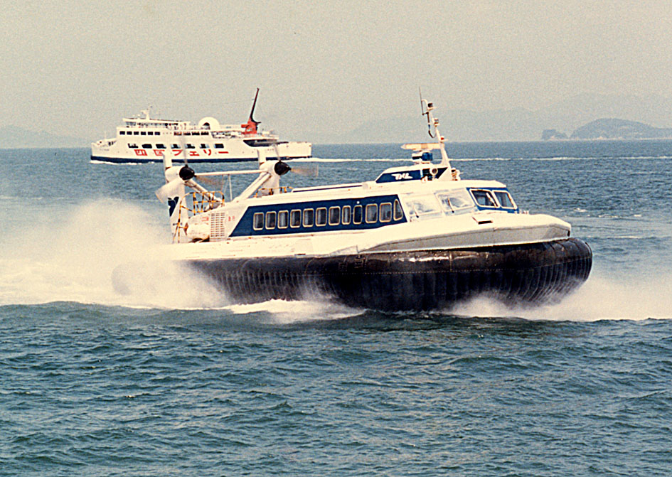 国鉄 宇高連絡船 急行便 ホーバークラフト とびうお